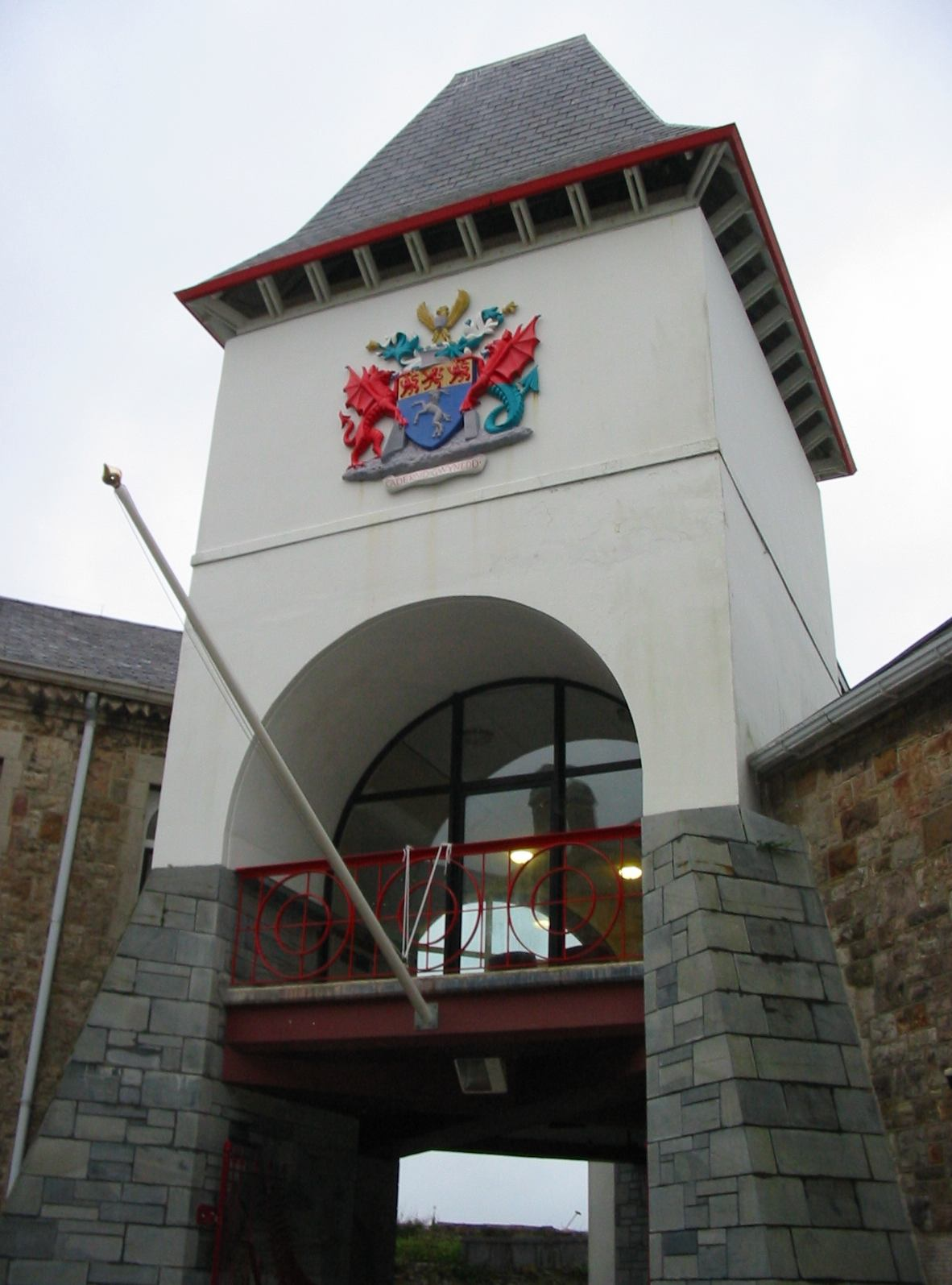 Gwynedd council offices, Caenarfon